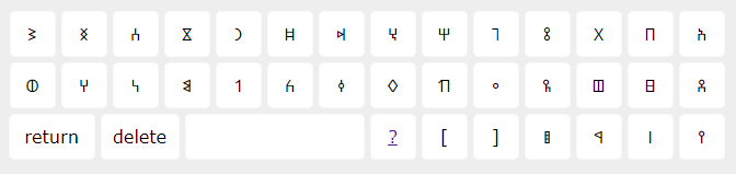 لوحة مفاتيح للكتابة بالمسند